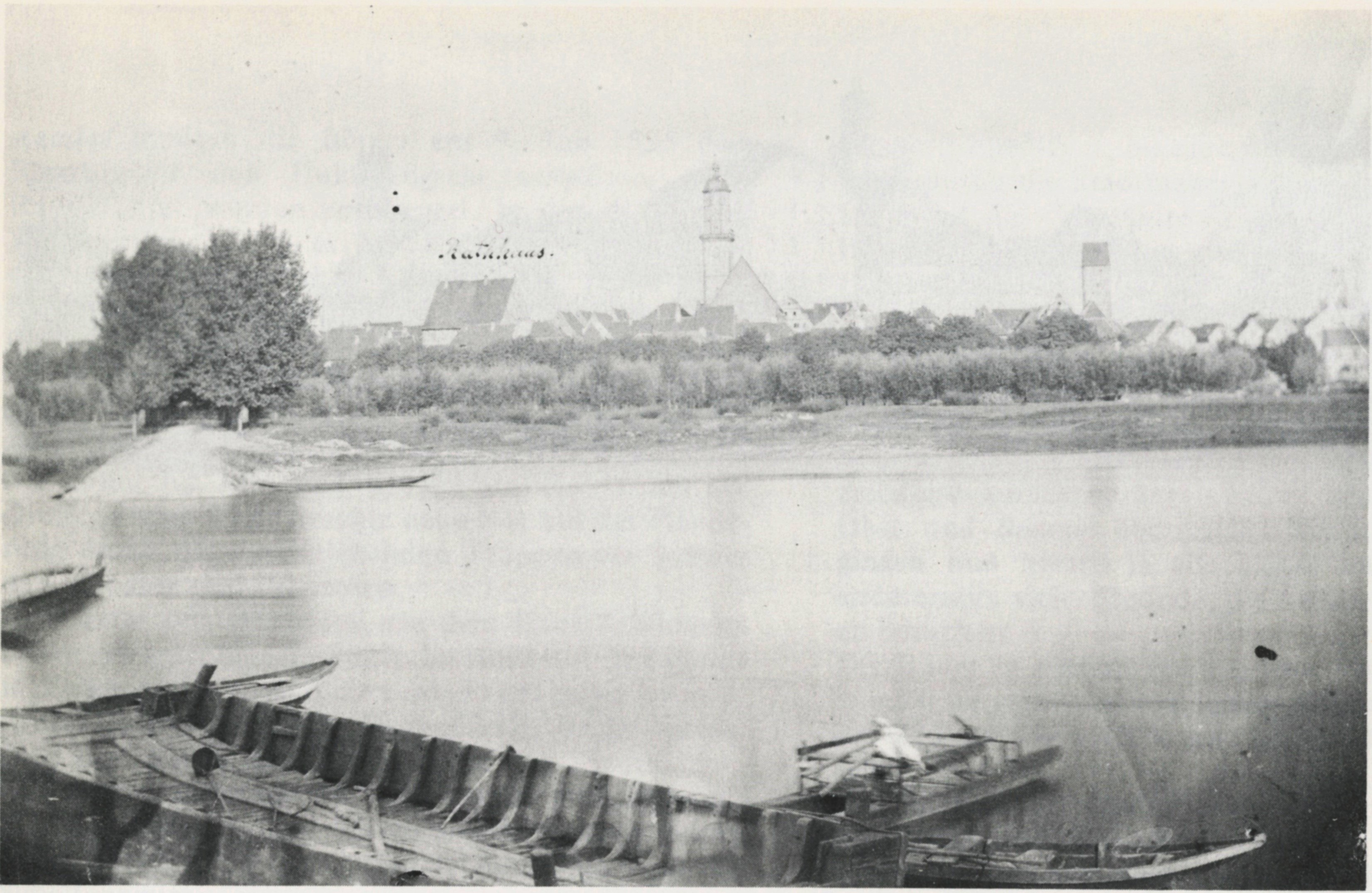 Fotografie der Stadt Volkach mit Rathaus (Beschriftung), Bartholomäuskirche, Sommeracher Tor. Davor die Mainfähre Astheim vor 1878 mit Anlegestelle und Allee.